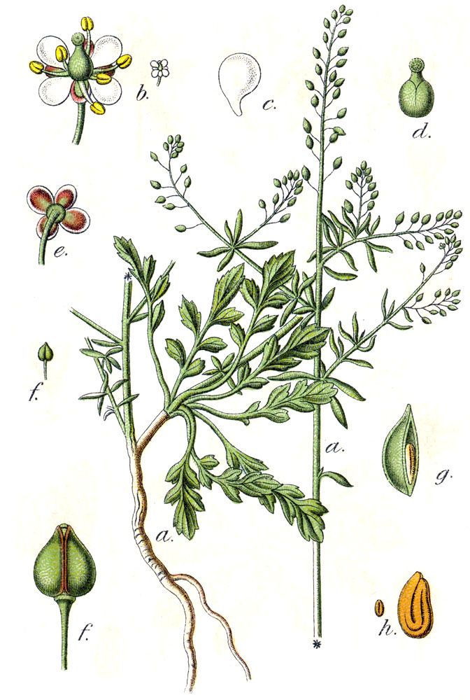 Lepidium graminifolium subsp. graminifolium, syn. Crucifera graminifolia (L.) E.H.L.Krause Original Caption Grasblättrige Kresse, Crucifera graminifolia